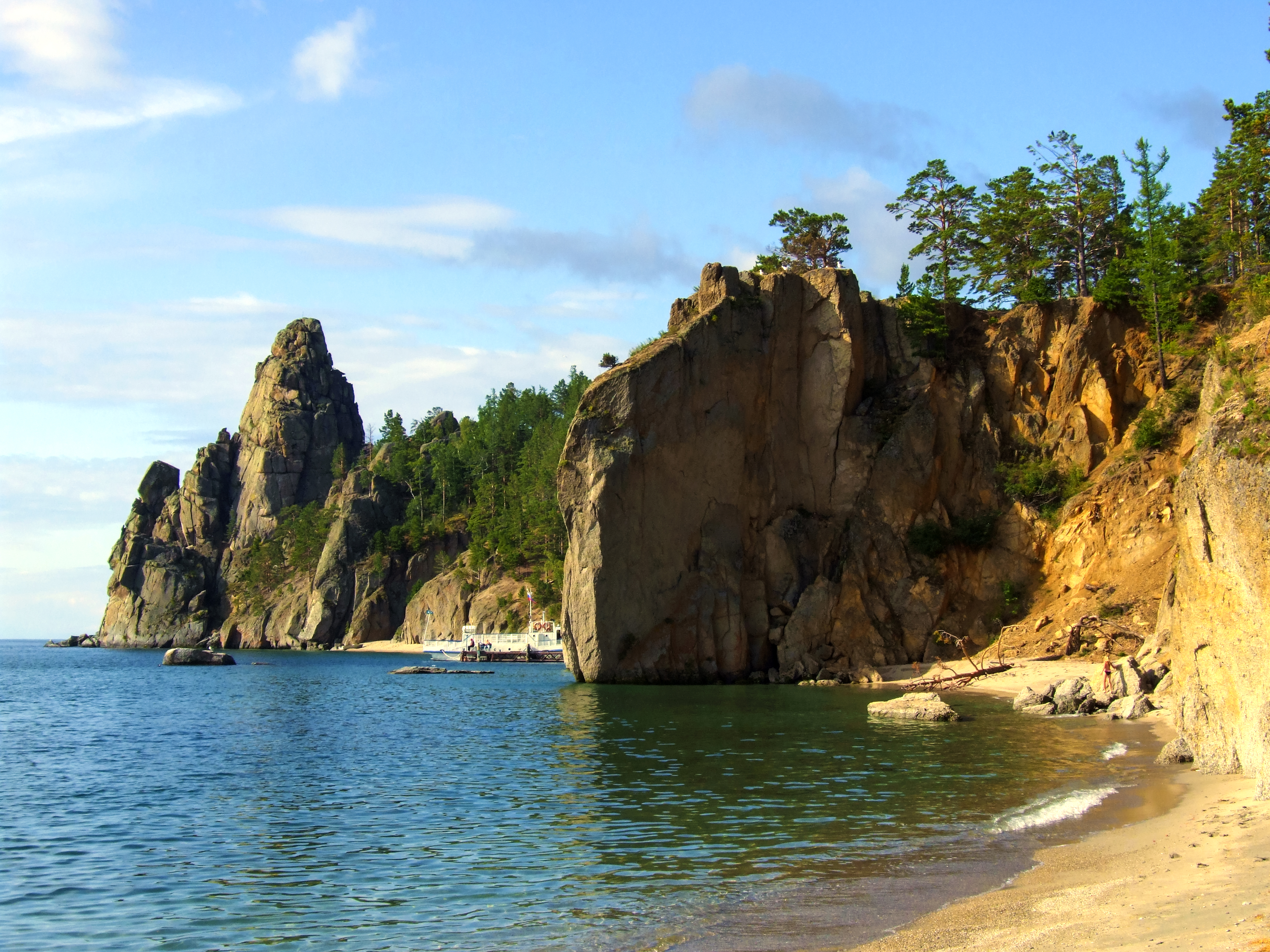 Песчаная бухта, Иркутский район. This image is related to the protected area of Russia number 3810088